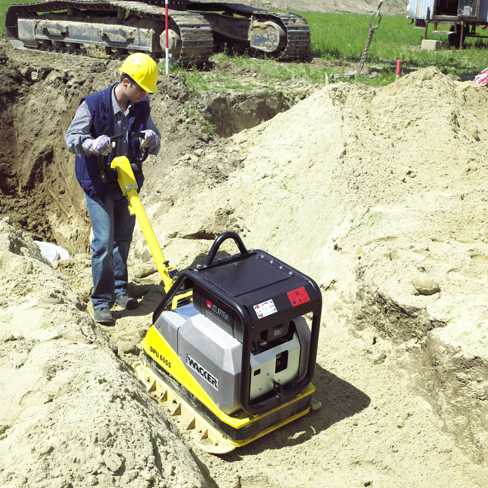 Reversierbare Vibrationsplatte Wacker DPU 6055